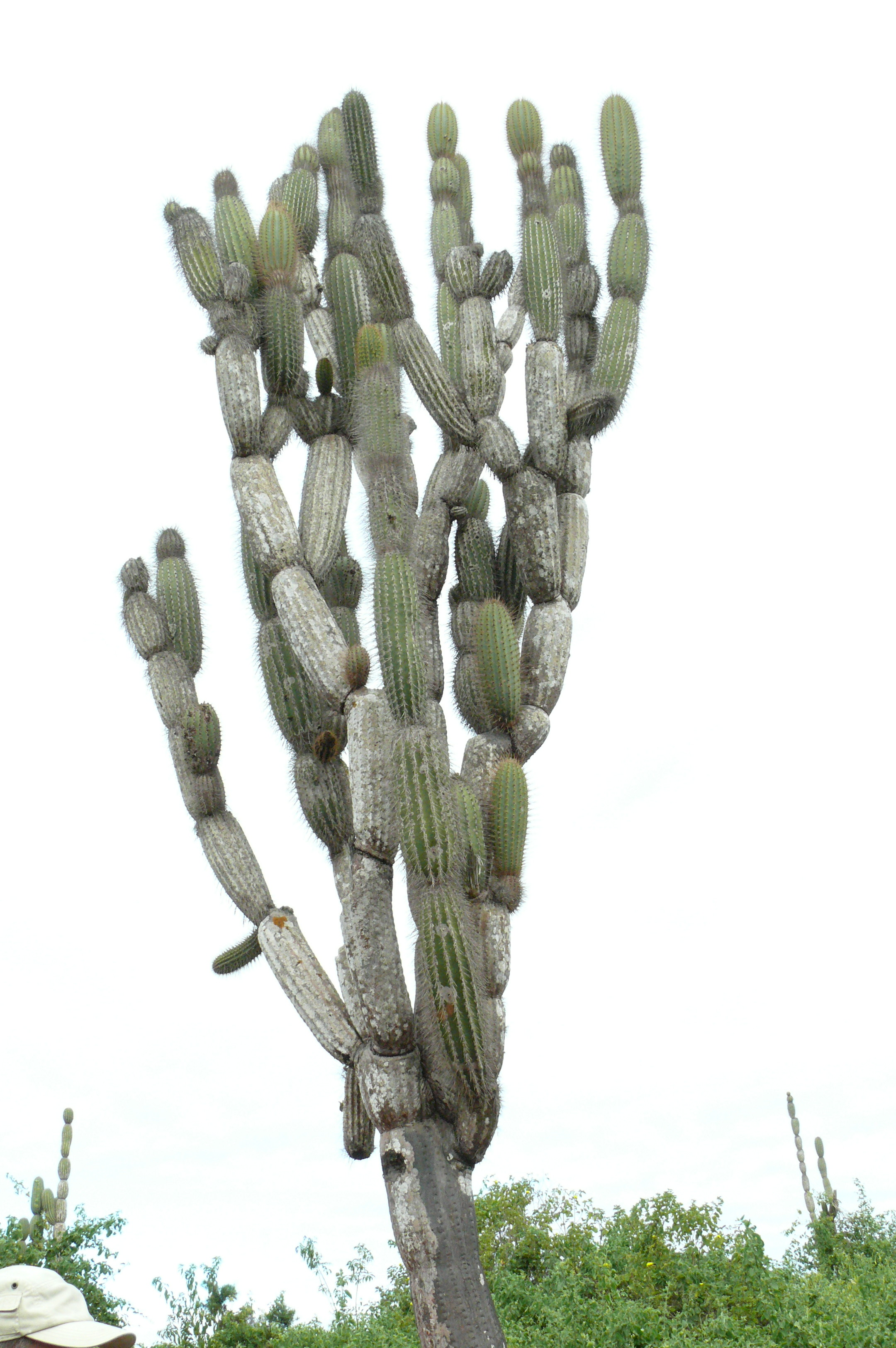 Galapagos-Säulenkaktus (Jasminocereus_thouarsii)